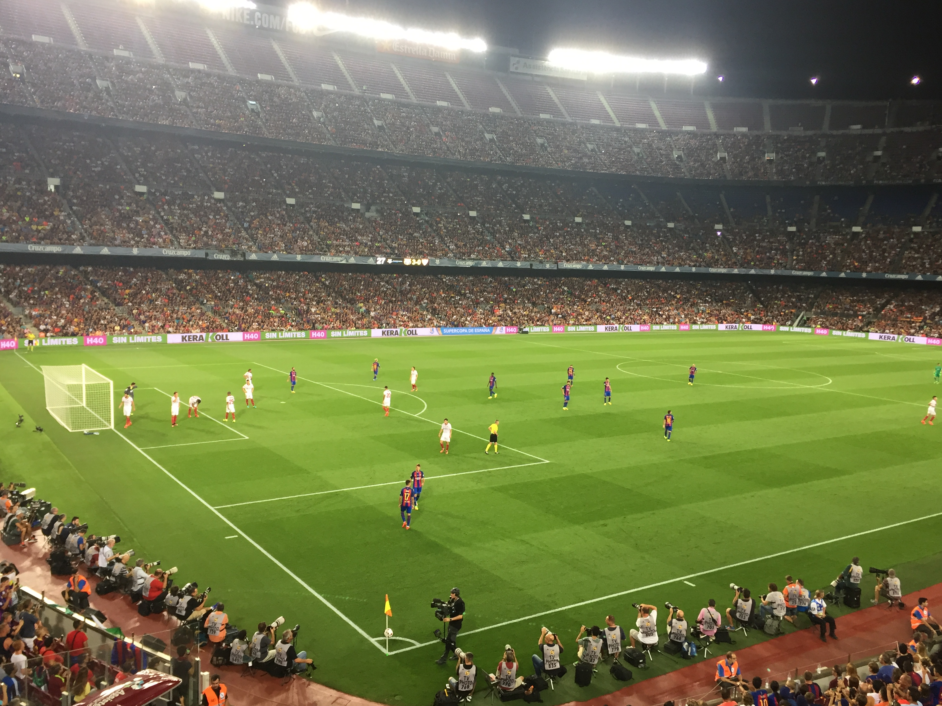 Instante del partido de vuelta del Barcelona-Sevilla de la Supercopa de España 2016